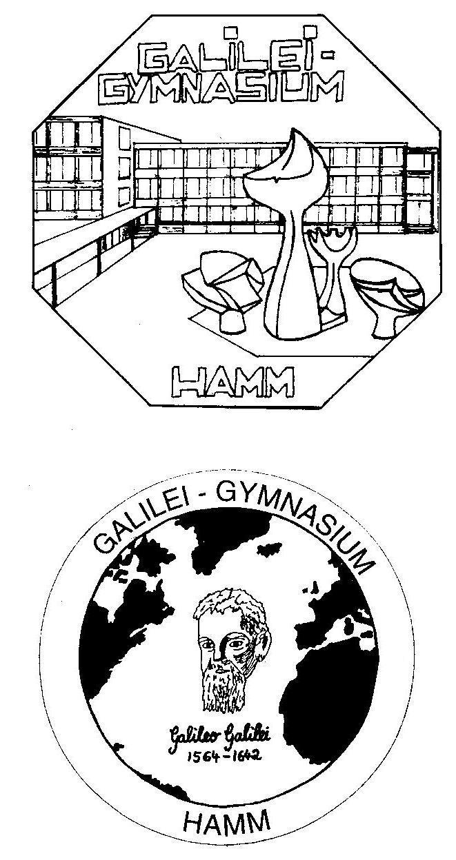 Das Bild zeigt zwei Entwürfe für ein Logo des Galilei-Gymnasiums Hamm. Der erste wurde von der Schule selbst entworfen, der zweite von zwei ehemaligen Schülerinnen.